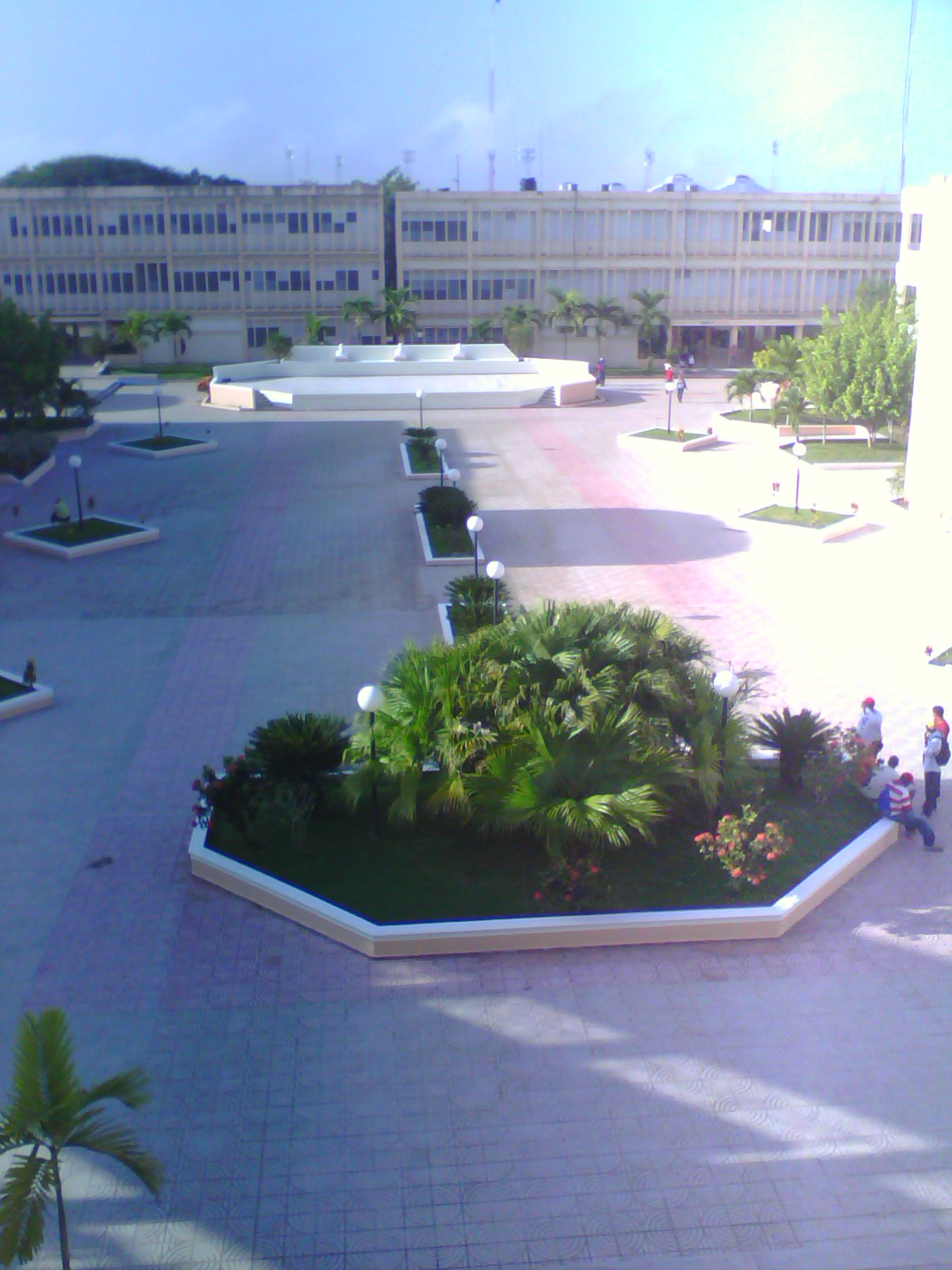 UASD resiento San Francisco de Macoris